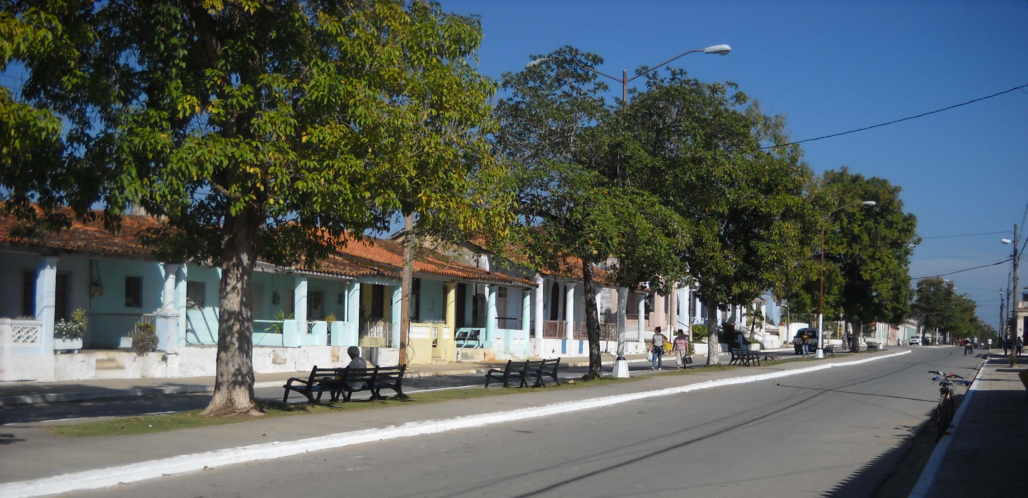 Foto del Paseo de la Avenida Juana Romero para utilizar en el artículo San Luis, Pinar del Río, Cuba.